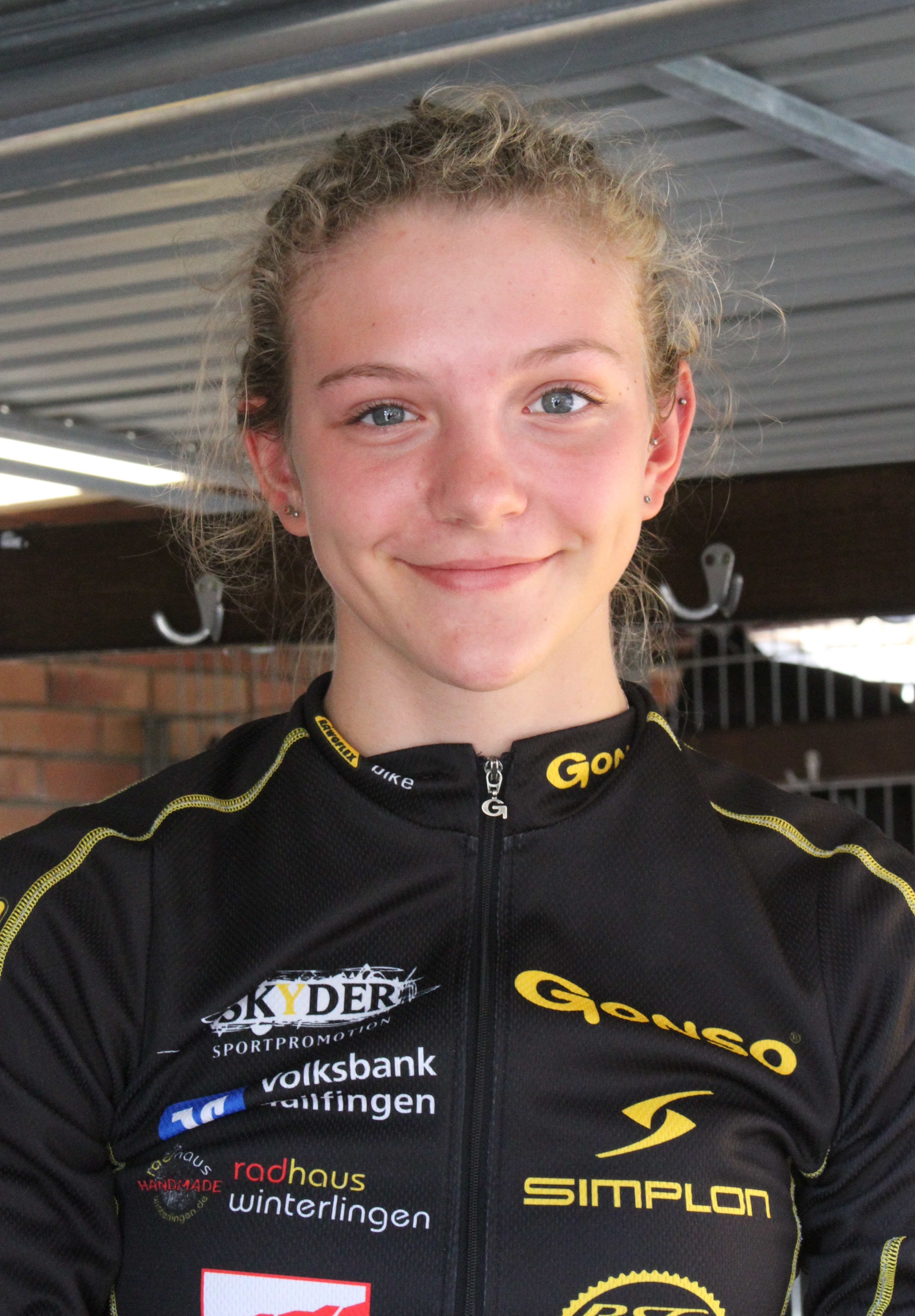 Alessa-Catriona Pröpster, deutsche Radsportlerin